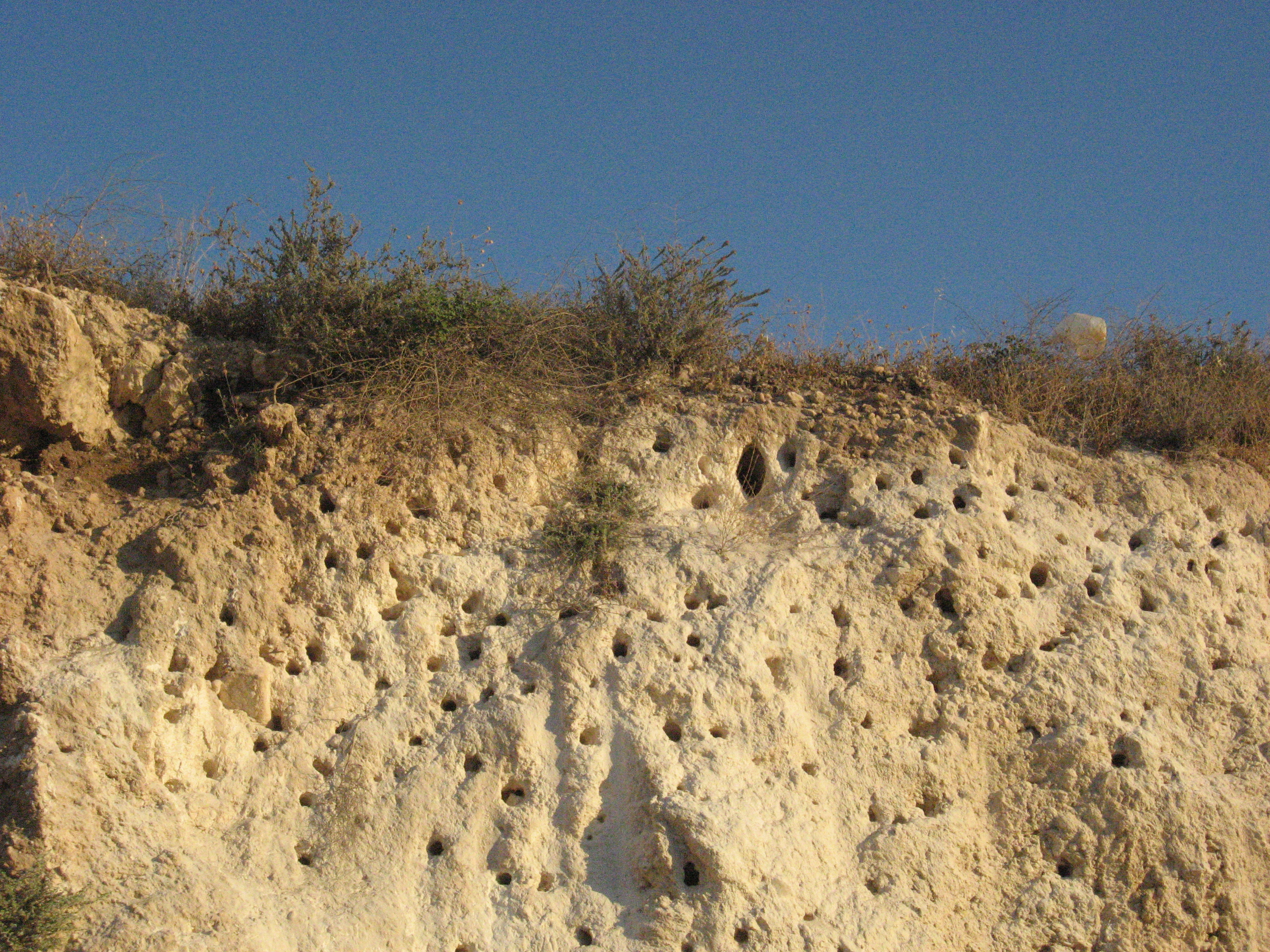 מצוק השרקרקים ליד הגבעה שבקצה רחוב עמק זבולון, מודיעין. באביב מגיעים לפה שרקרקים ממין שרקרק מצוי ומקננים בהמוניהם בחורים שחצבו, ואותם ניתן לראות כאן.